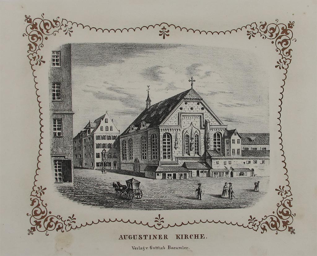 Alt-Nürnberg, Augustinerkirche, Lithographie, bei Gottlieb Bäumler, Nürnberg 1846. Ca. 14 x 17 cm